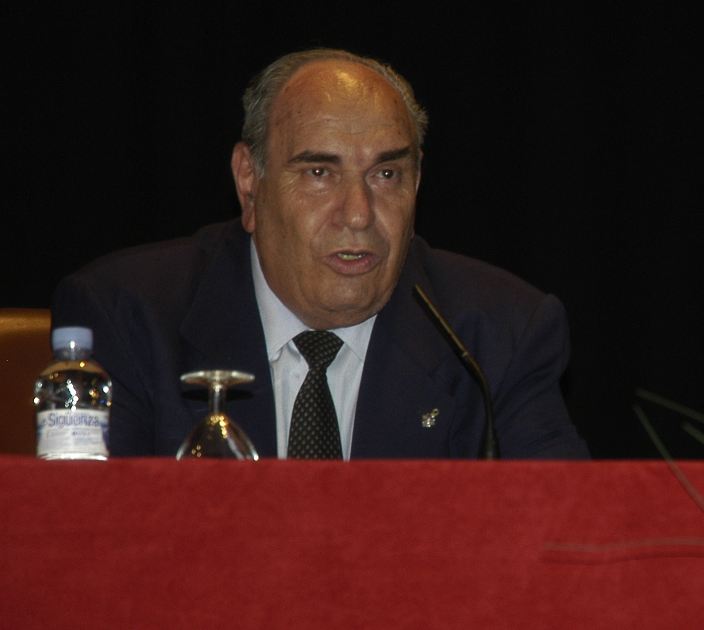 Francisco Olivencia Ruiz durante una conferencia (2006)